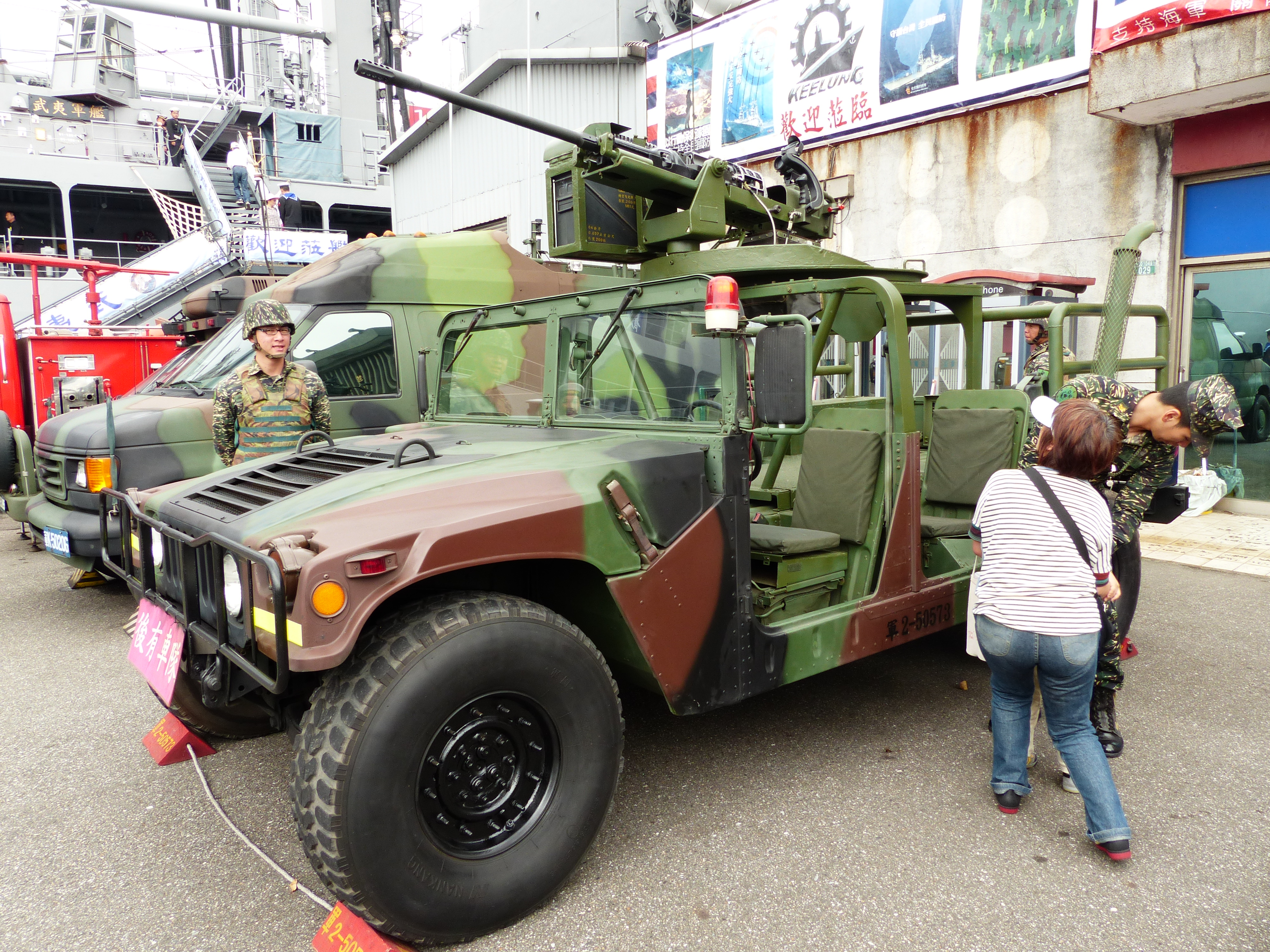 海軍陸戰隊士官與母親幫助孩子登上悍馬車。